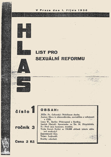 Front page Hlas No. 1 Vol. 3